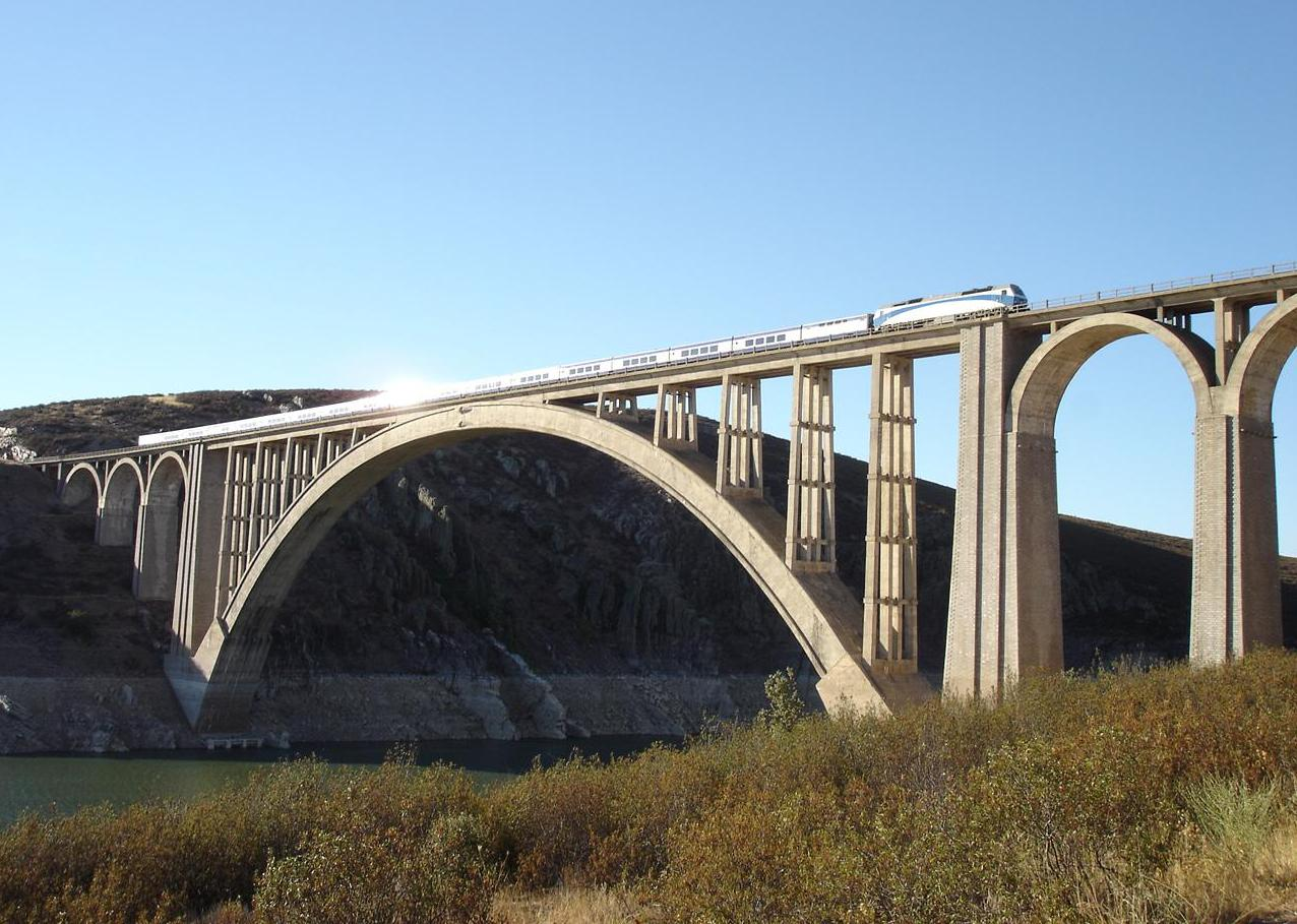 Manzanal del Barco (Zamora)